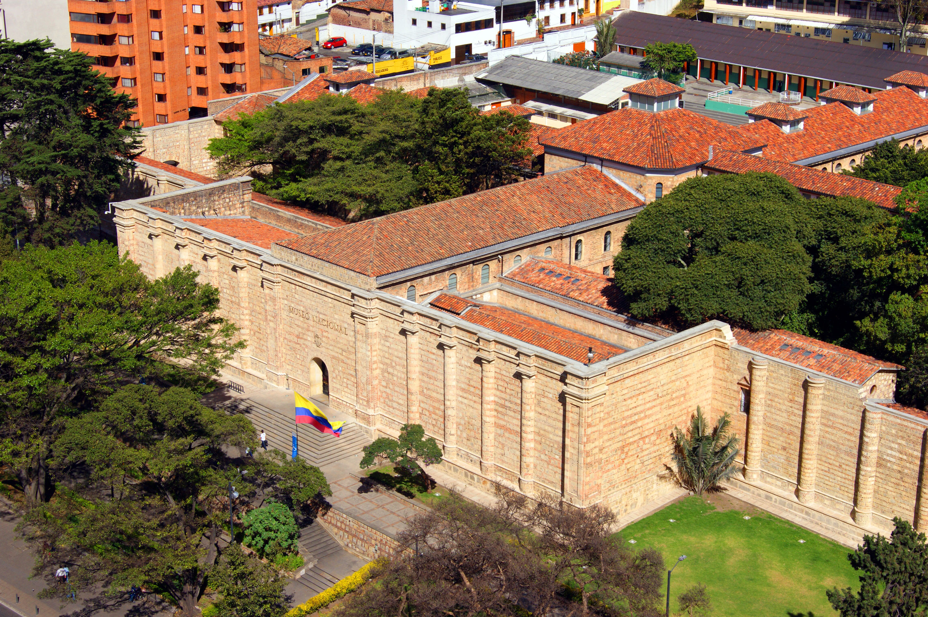 Vista de la Fachada del Museo Nacional de Colombia desde la terraza del edificio Residencias Tequendama